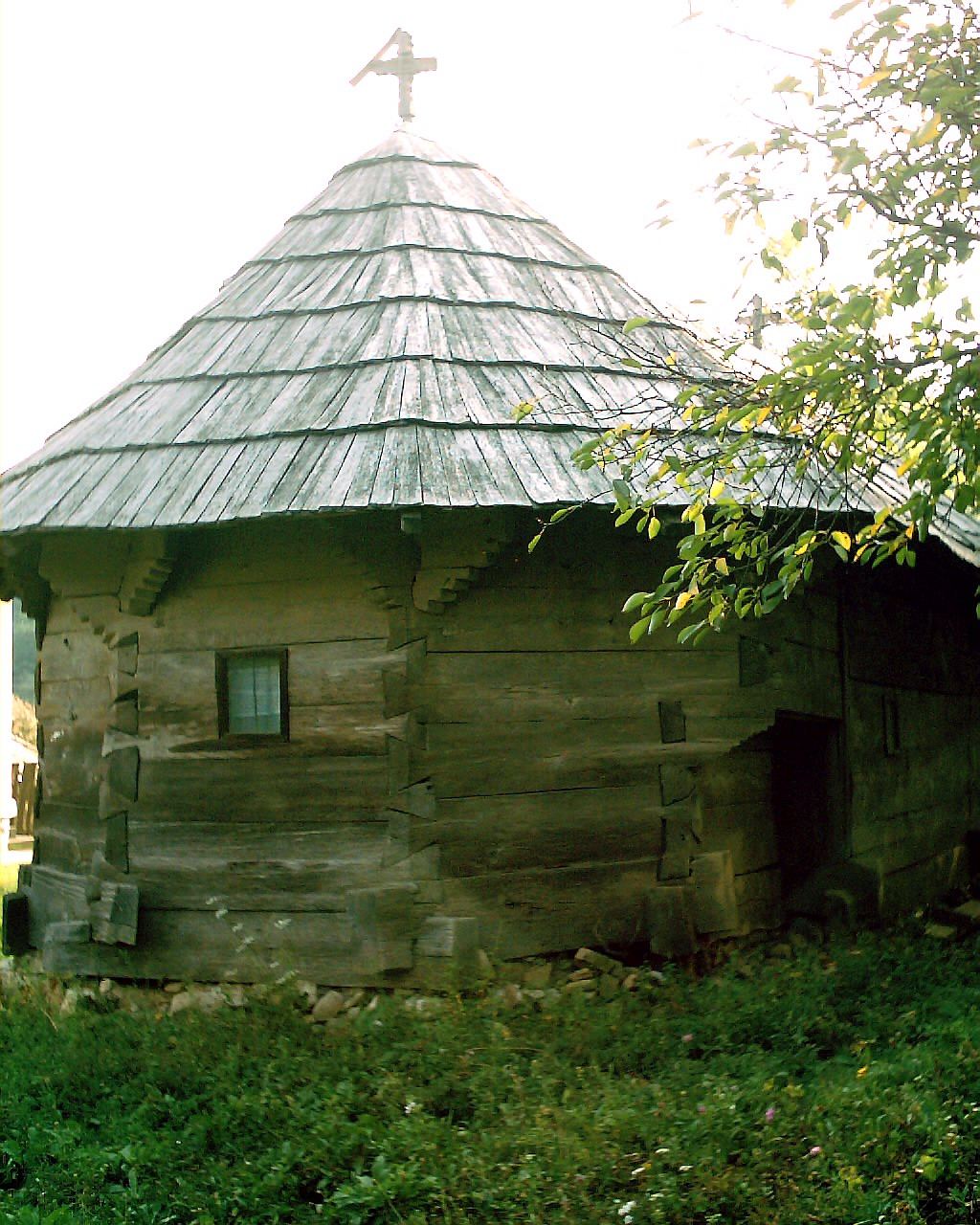 Biserica de lemn "Sf. Andrei" din satul Pocruia, oraşul Tismana, Gorj, construită la 1807